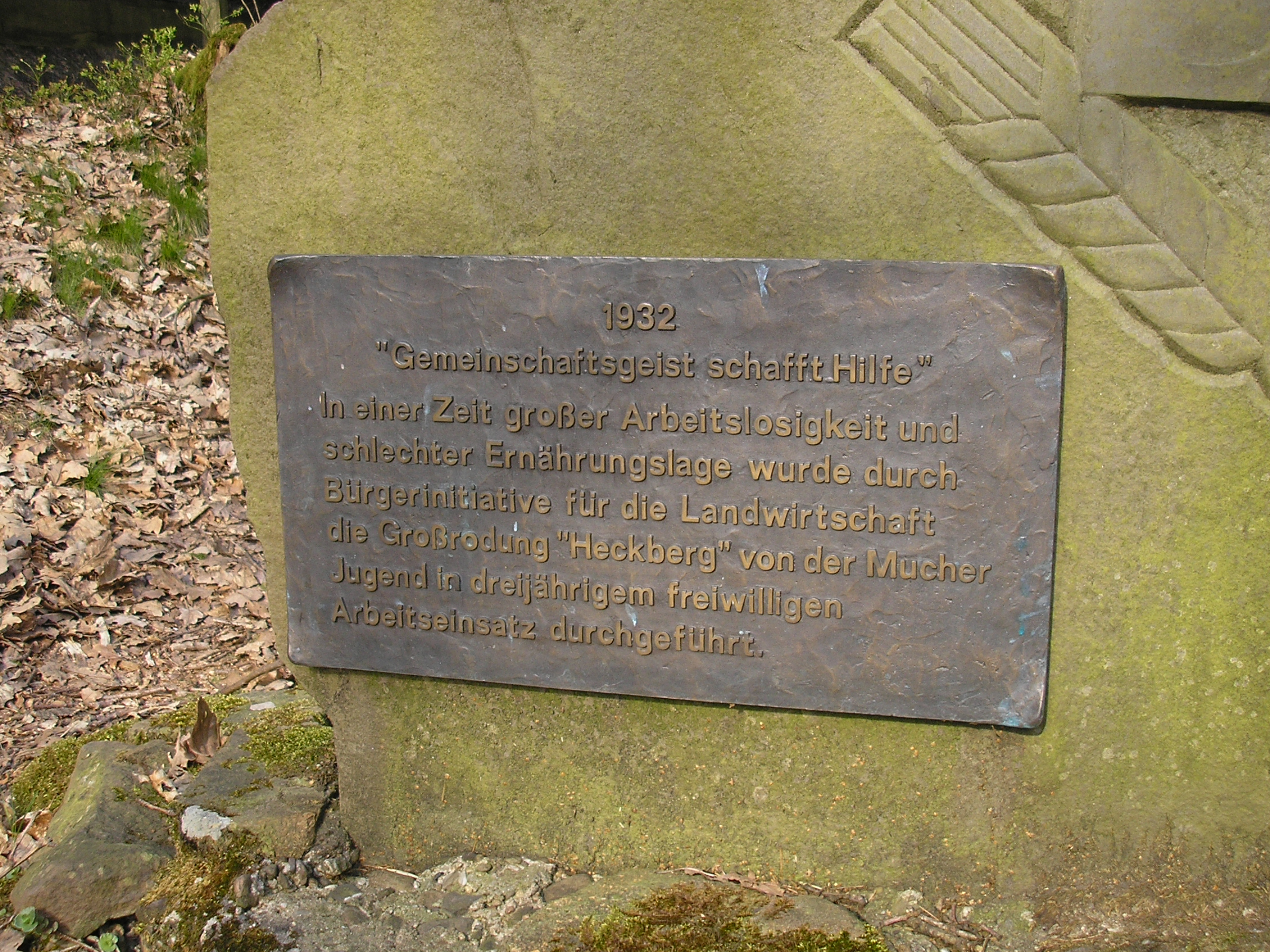 Erinnerungstafel auf dem Heckberg in der Gemeinde Much.